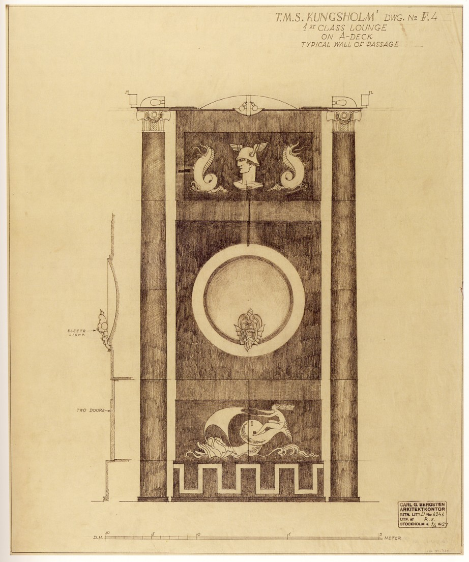 M/S Kungsholm 1928, inredningsritning av Carl Bergstens arkitektkontor 1927